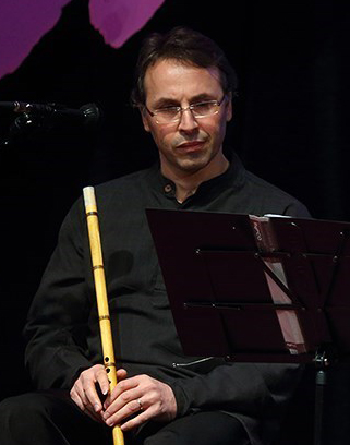 سیامک جهانگیری کنسرت حسین علیزاده و گروه هم آوایان ۰۸ دی ۱۳۹۴